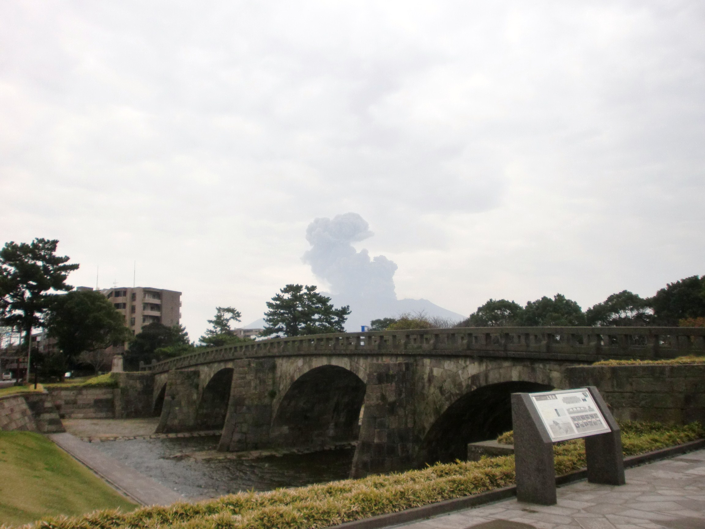 甲突川五石橋のうちであった玉江橋は現在石橋記念公園に移設復元されている。